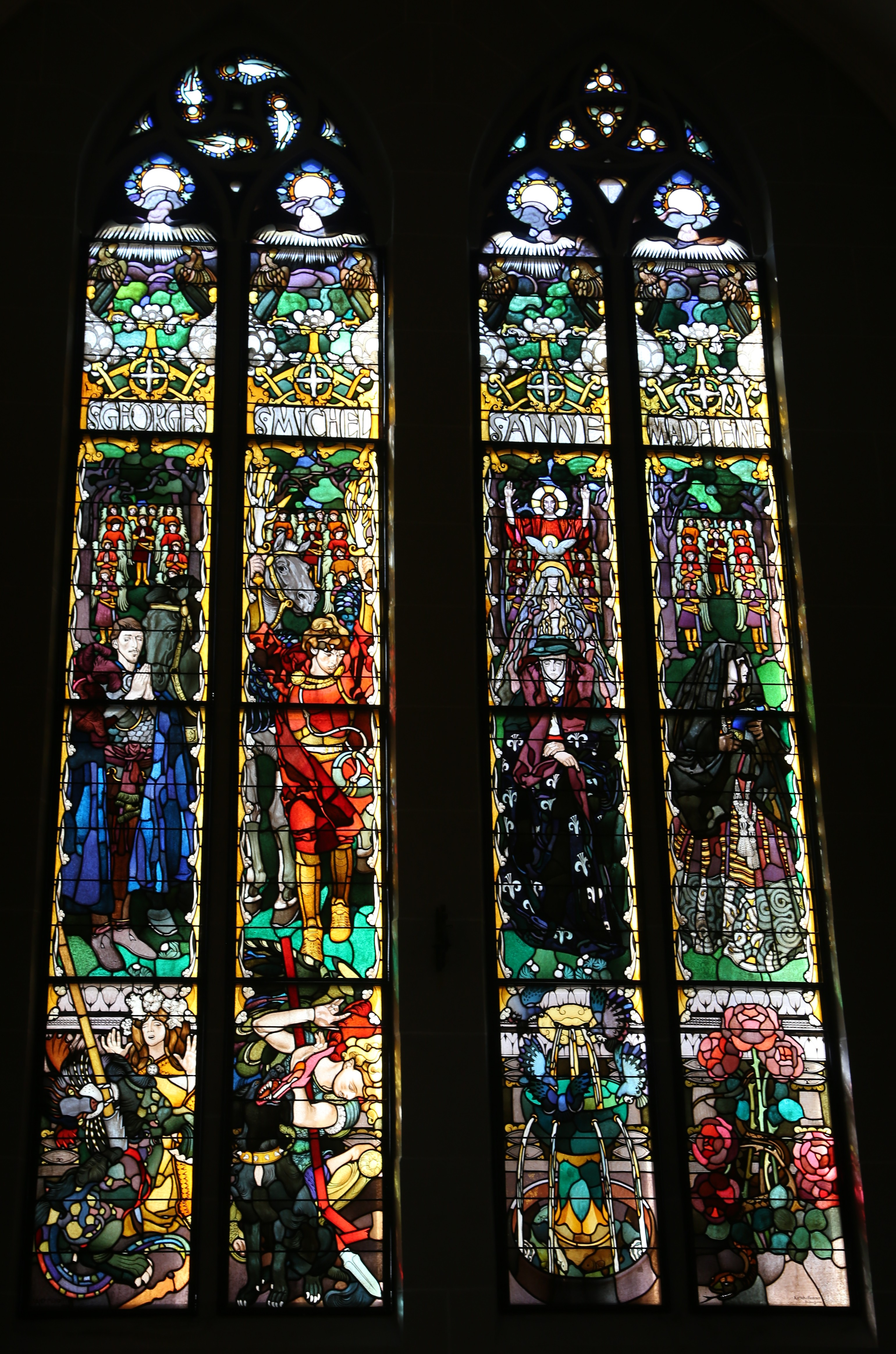 Nikolaus, Fenster, Fribourg